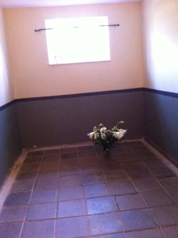 cel 115